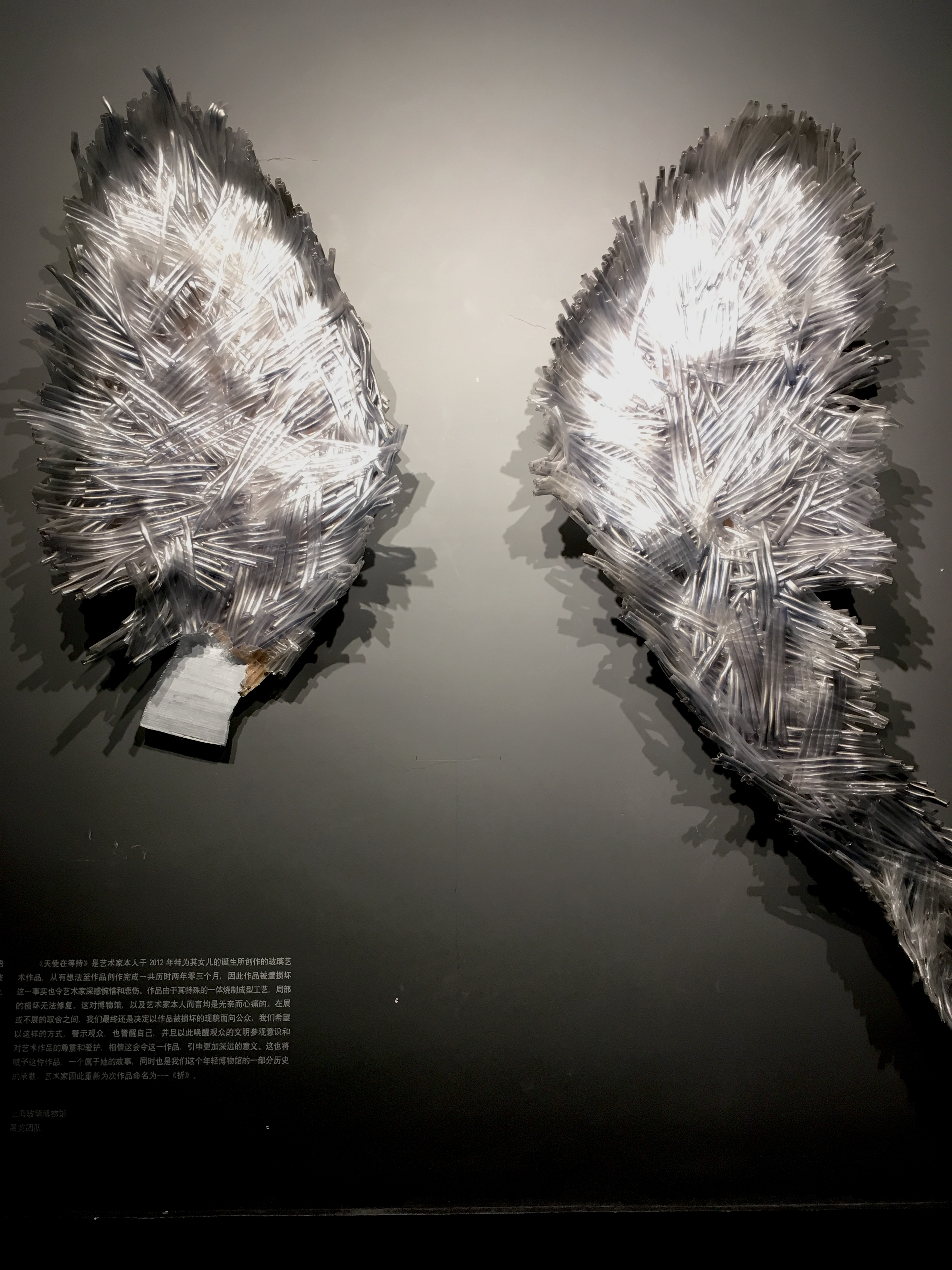 拍摄于2016年夏天，iPhone SE